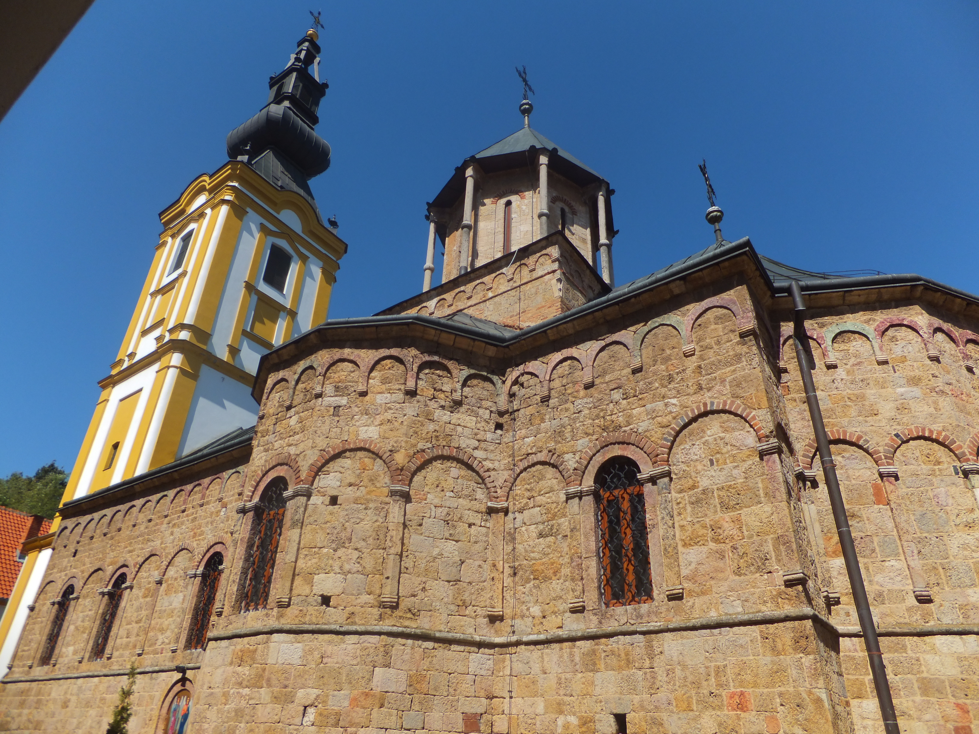 Манастир Привина Глава